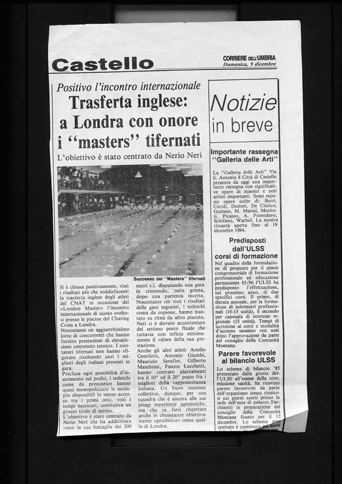 Trasferta Inglese - Novembre '84